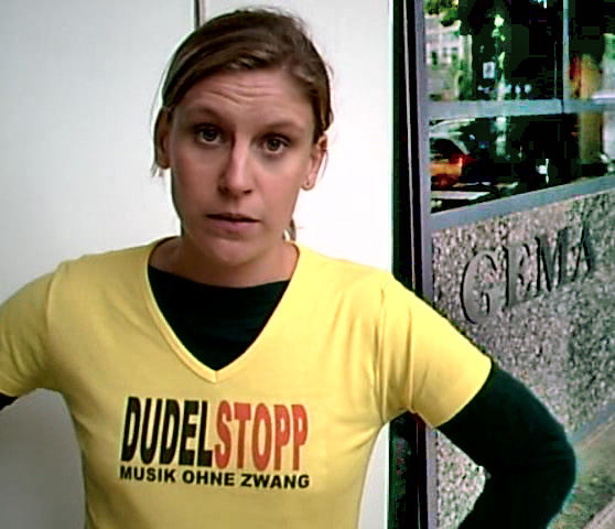 Katharina Gebhardt, Aktion am 07.05.2007 vor der GEMA-Zentrale in der Bayreuther Straße 37, 10787 Berlin